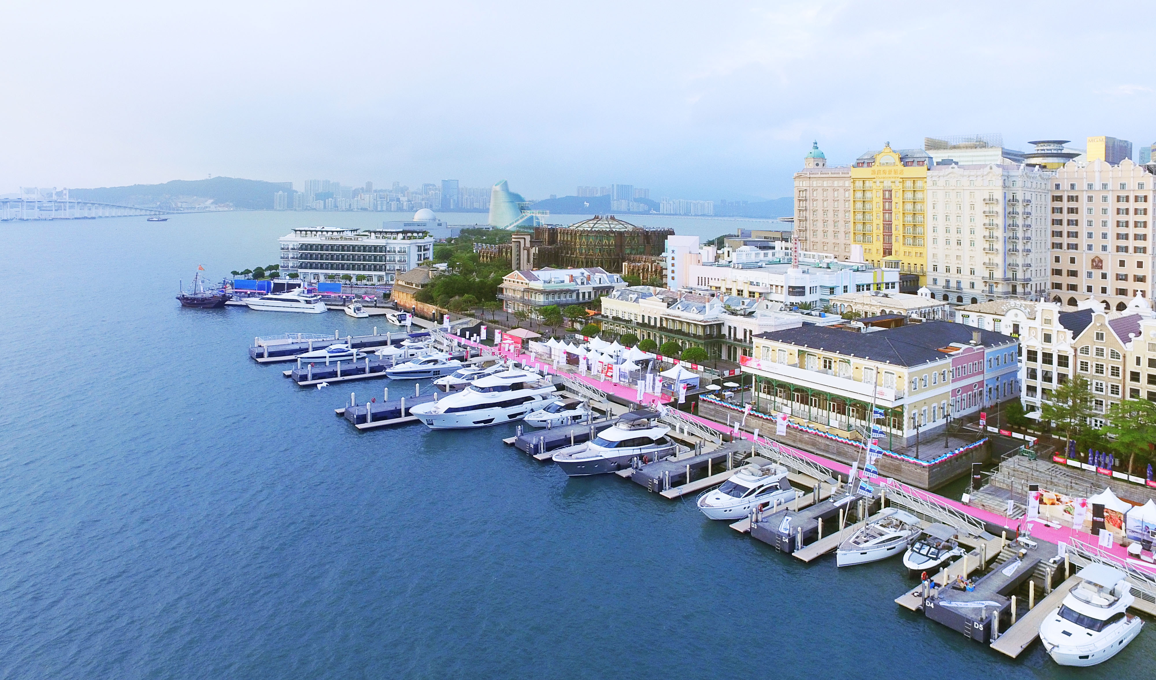 澳門漁人碼頭綜合設施